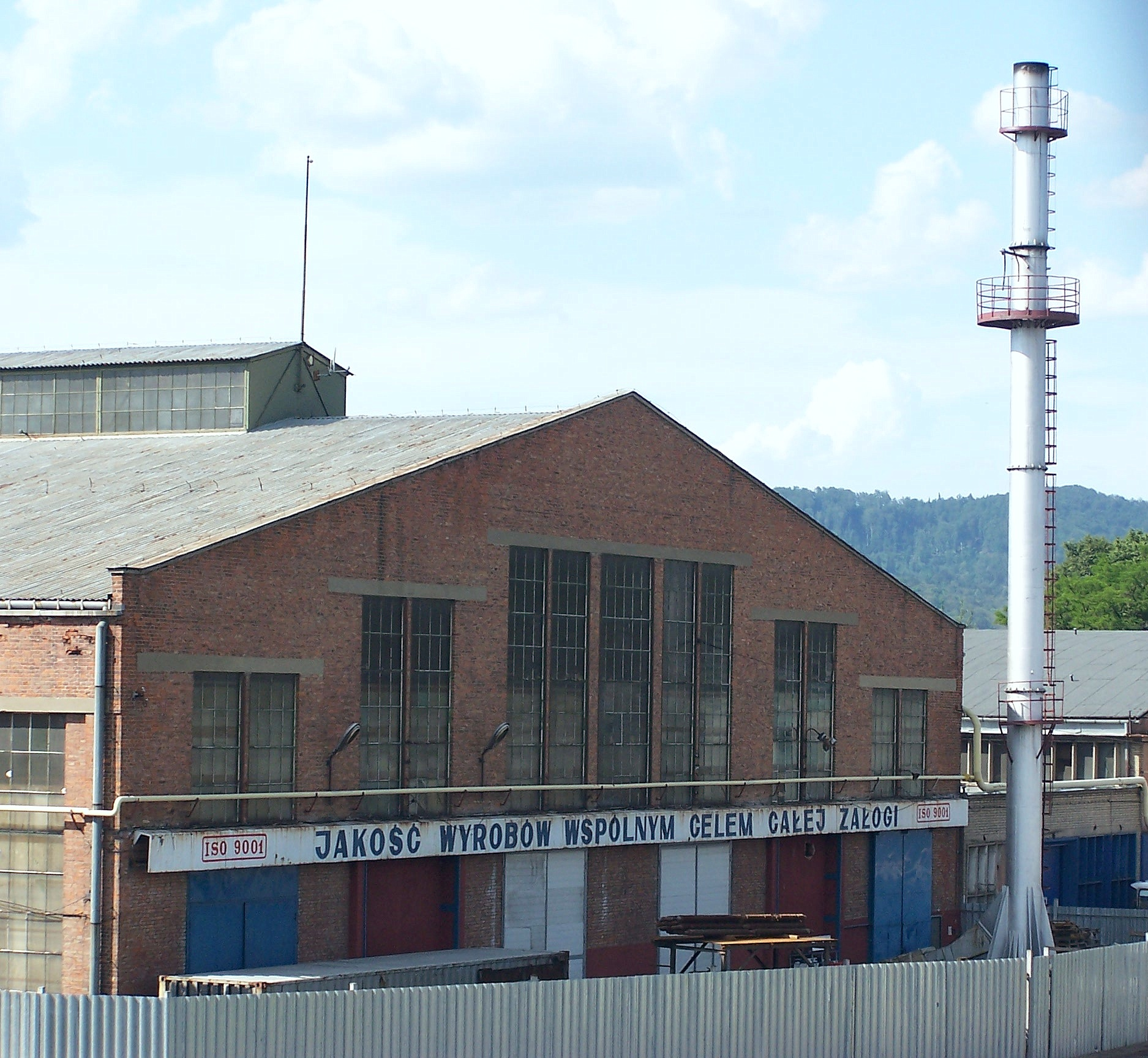 Budynki fabryczne Autosanu - ISO 900.